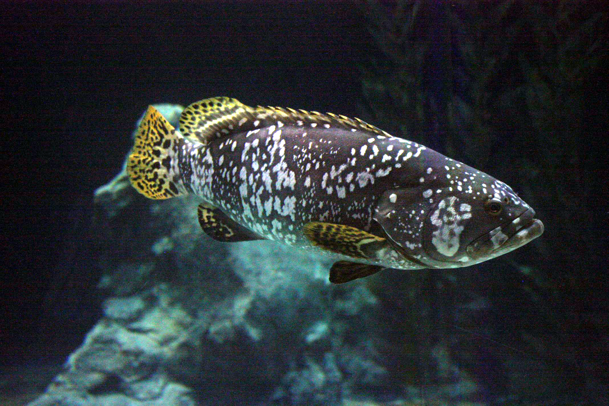 Fisch im Loro Parque